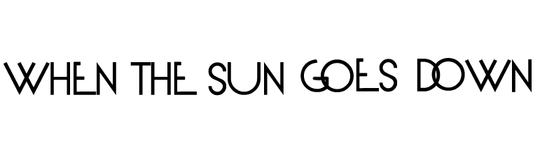 affiche del 3er álbum de estudio de Selena Gomez & the Scene